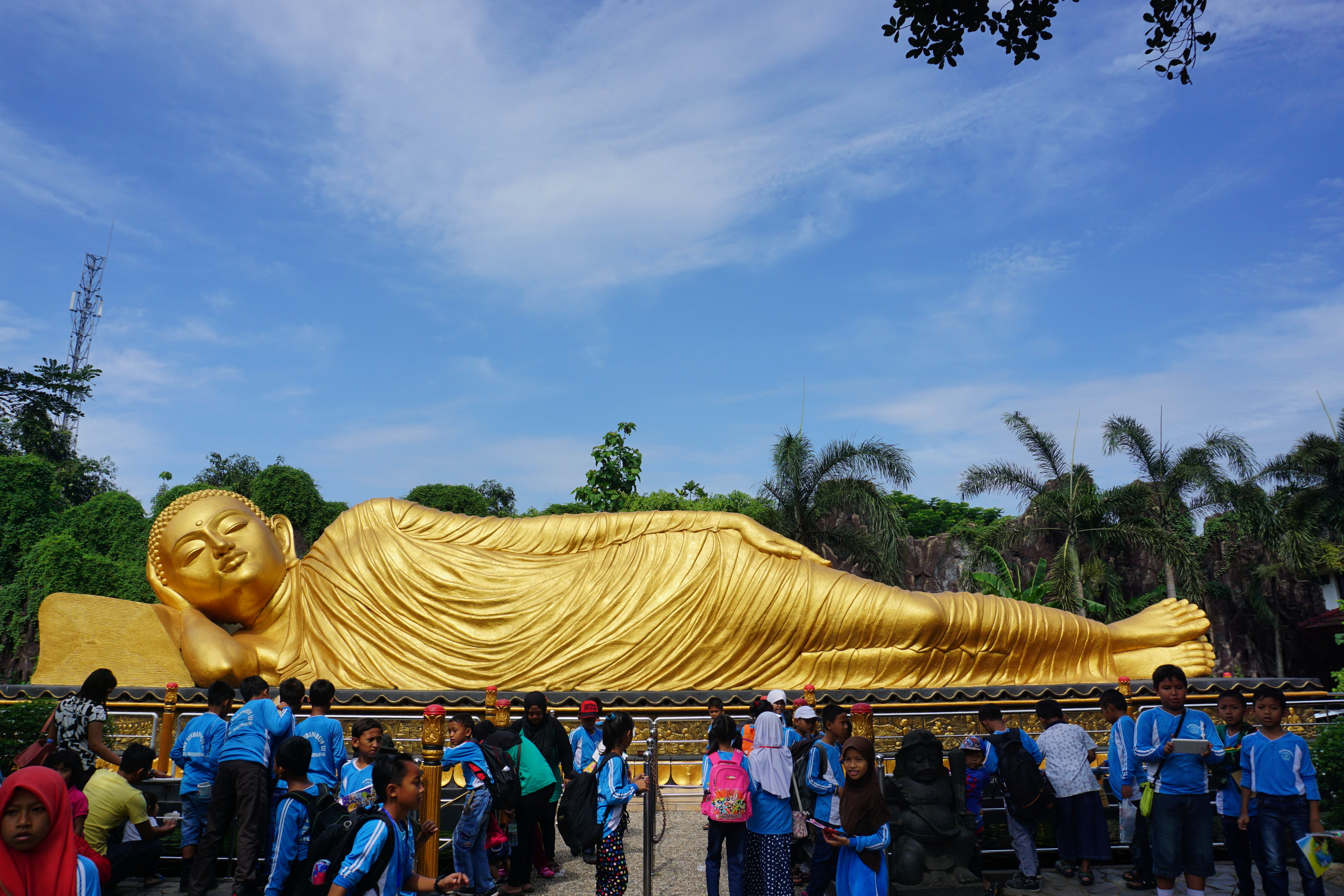 Maha Vihara Mojopahit, Trowulan, East Java